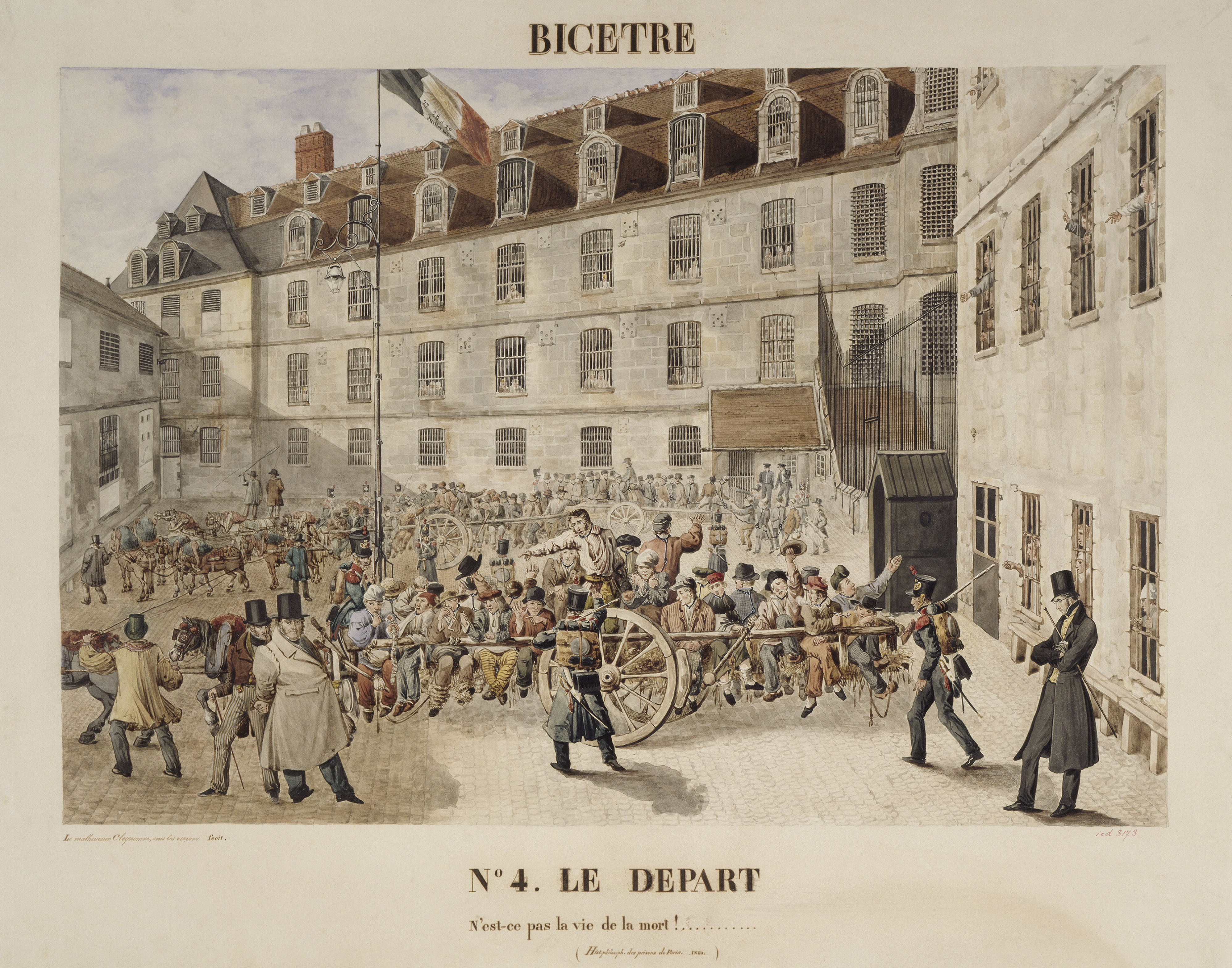 La prison de Bicêtre à Gentilly - le départ de la chaîne des forçats pour le bagne. Aquarelle appartenant à une série peinte par le forçat Gabriel Cloquemin, arrêté par Vidocq en 1832.